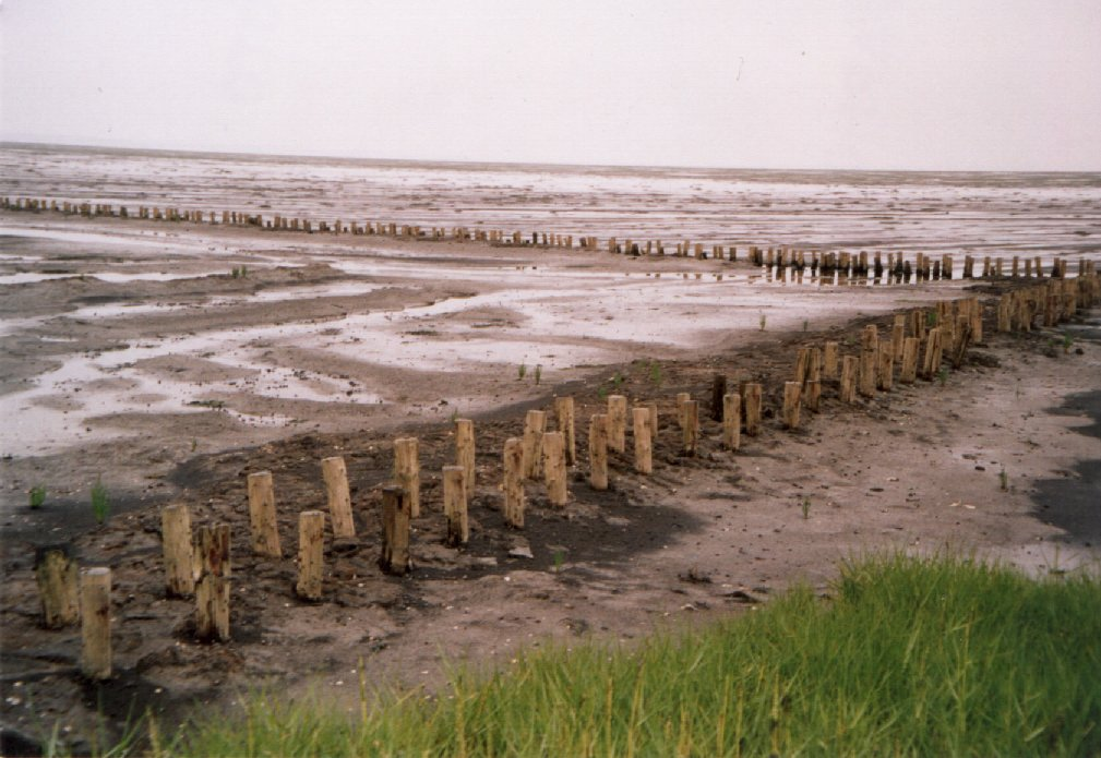 Lahnung im Wattenmeer bei Morsum/Sylt (selbst fotografiert).